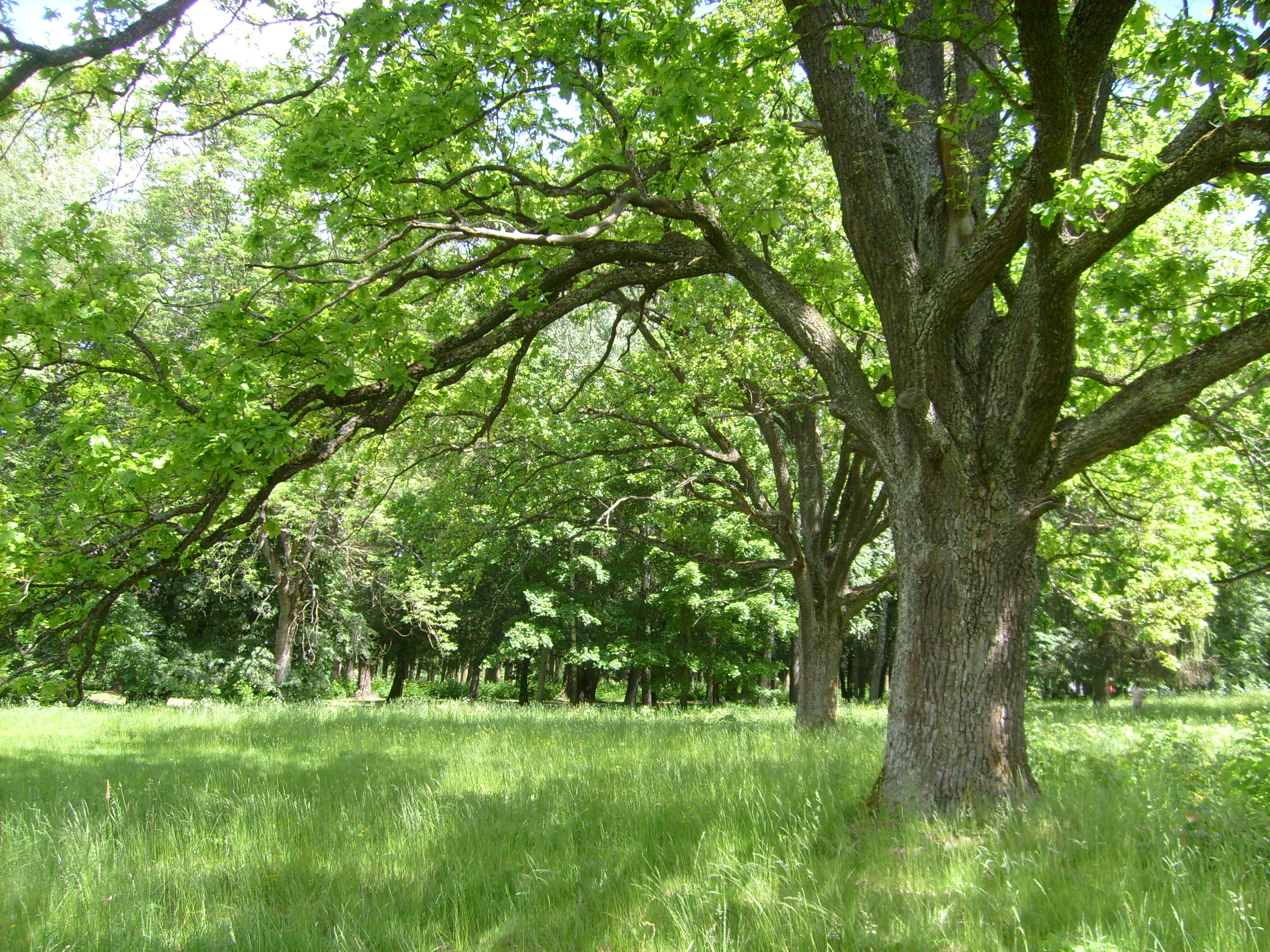 Двухсотлетние деревья в грудиновском парке